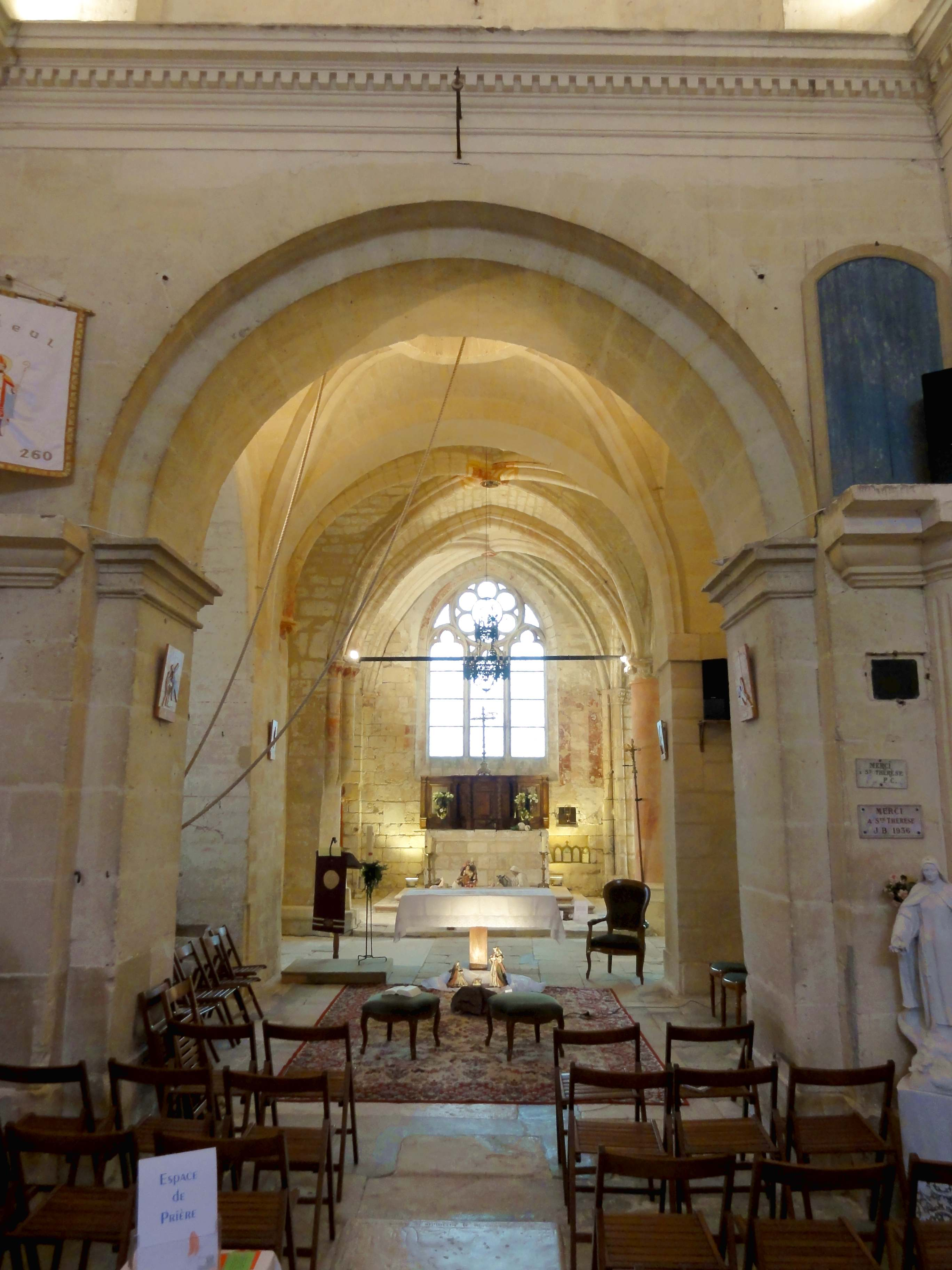 Nef, arc triomphal.